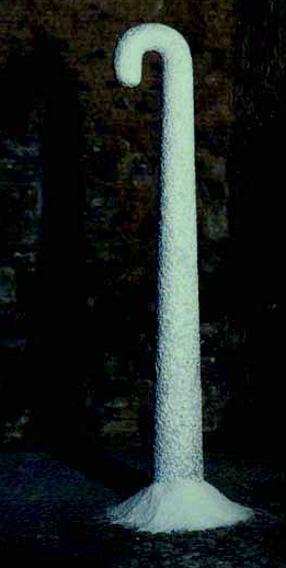 Canne en marbre de Carrare et sel